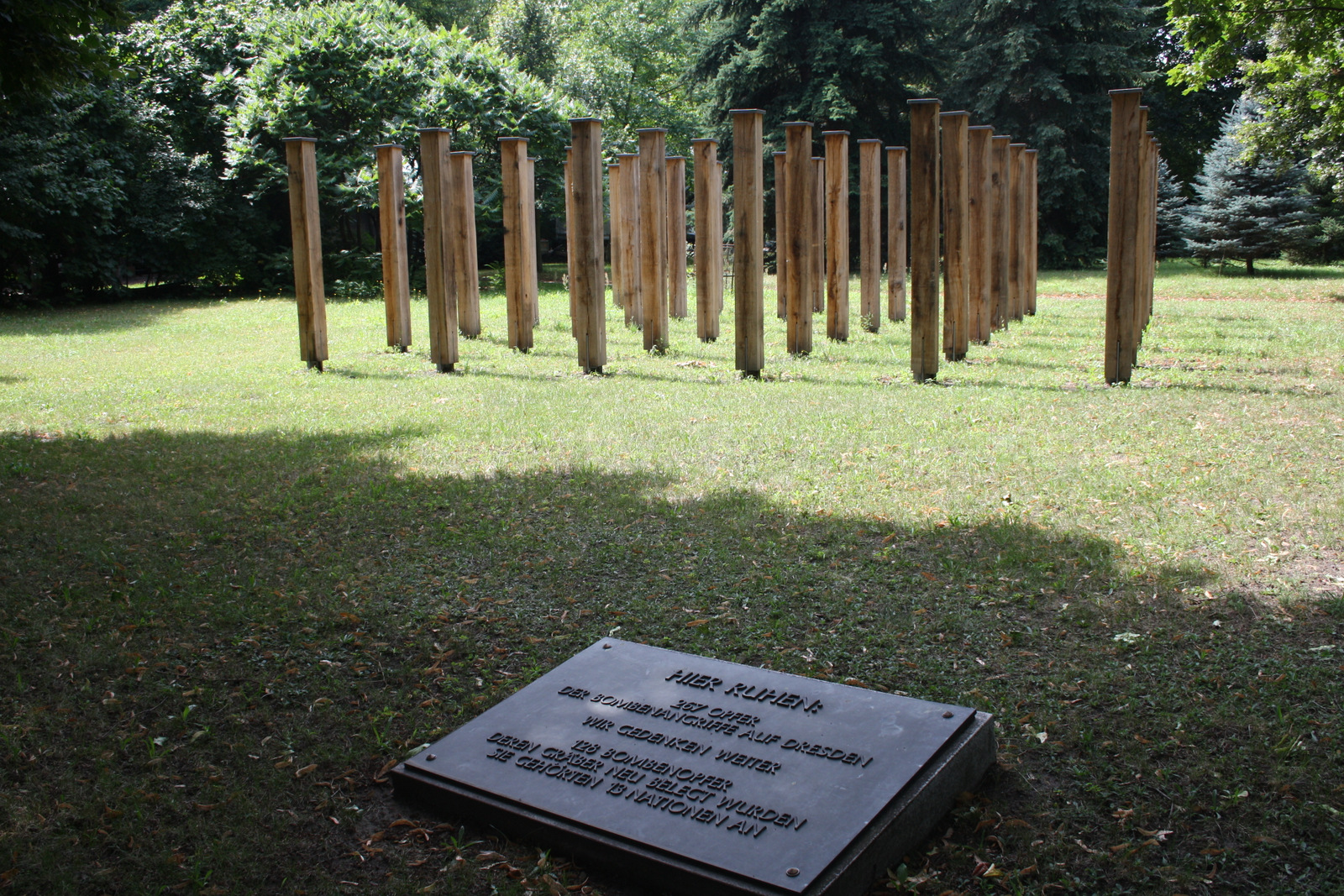 Stelen und Bronzeplatte zum Gedenken an 267 Opfer der Bombenangriffe auf Dresden.